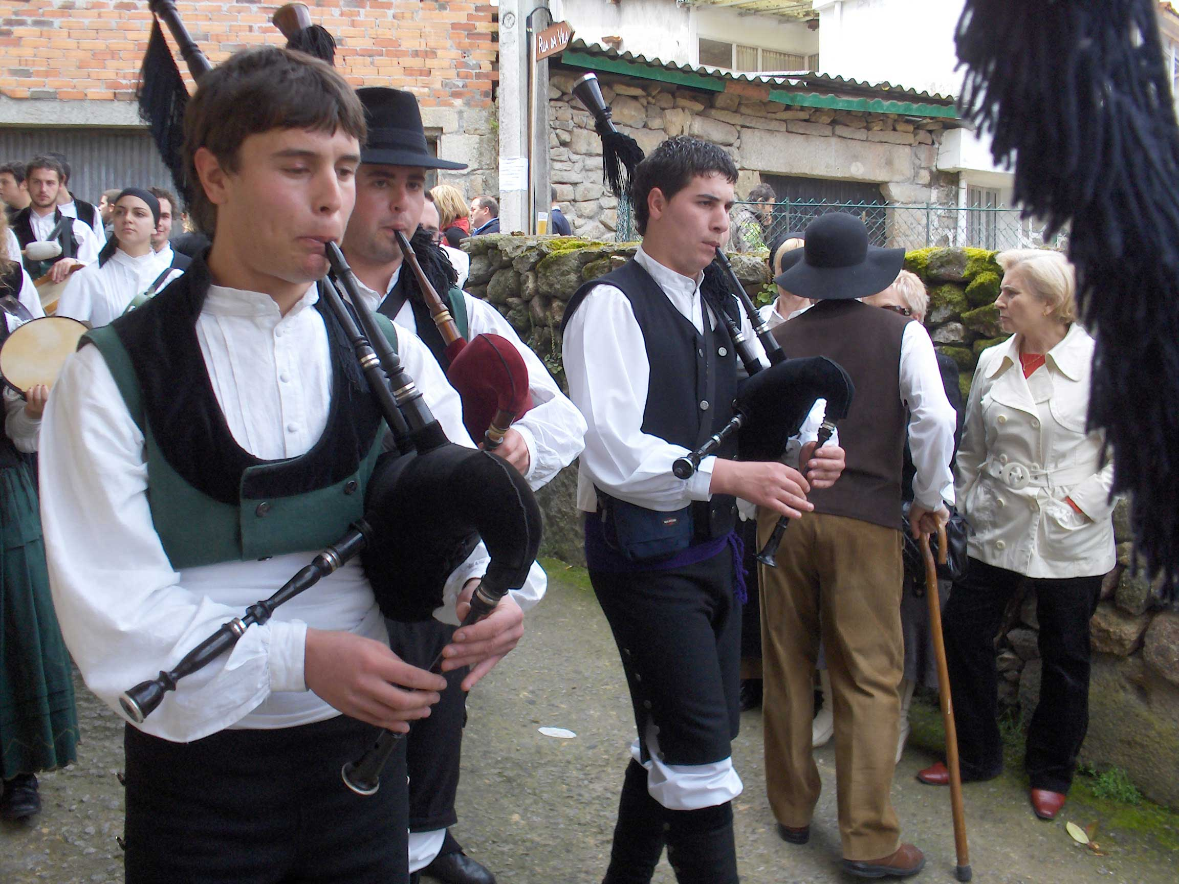 Vilanova dos Infantes, Celanova, Ourense, Galicia. Romería Etnográfica Raigame. 17 de Mayo de 2008.